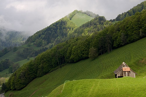 Hüglige Landschaft bei Oberbeinwil